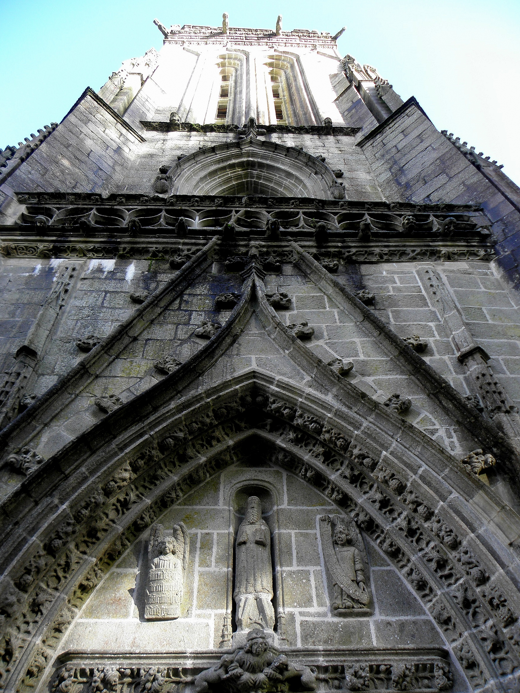 Façade ouest de la chapelle Saint-Herbot en Plonévez-du-Faou (29).